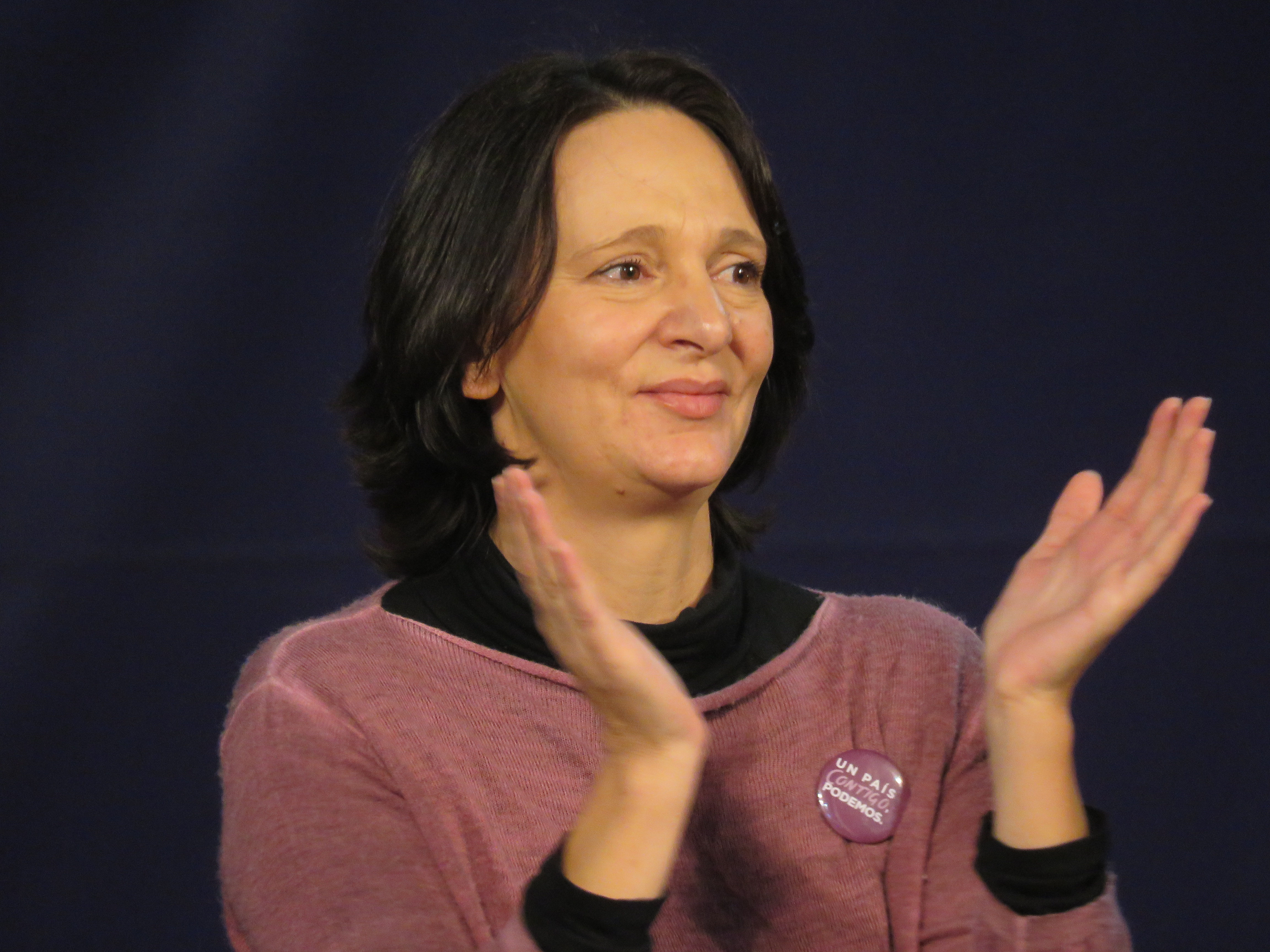 Esta imagen corresponde a Carolina Bescansa, número dos del emergen partido político español Podemos, que en las elecciones del pasado 20 de diciembre de 2015 obtuvo 69 escaños.